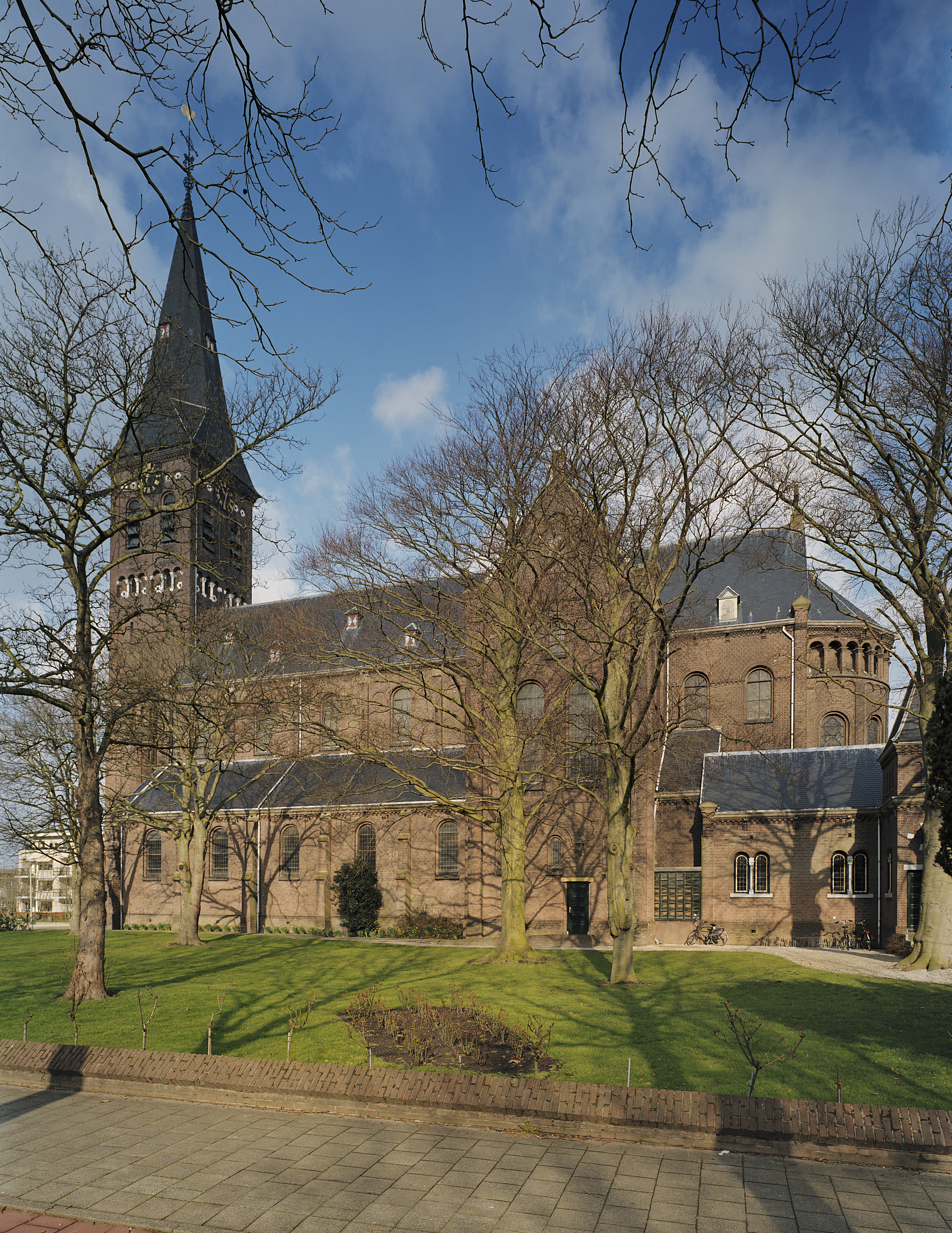 Rooms-Katholieke Sint-Johannes de doperkerk: Overzicht zuidgevel (opmerking: Gefotografeerd voor Monumenten In Nederland Zuid-Holland)